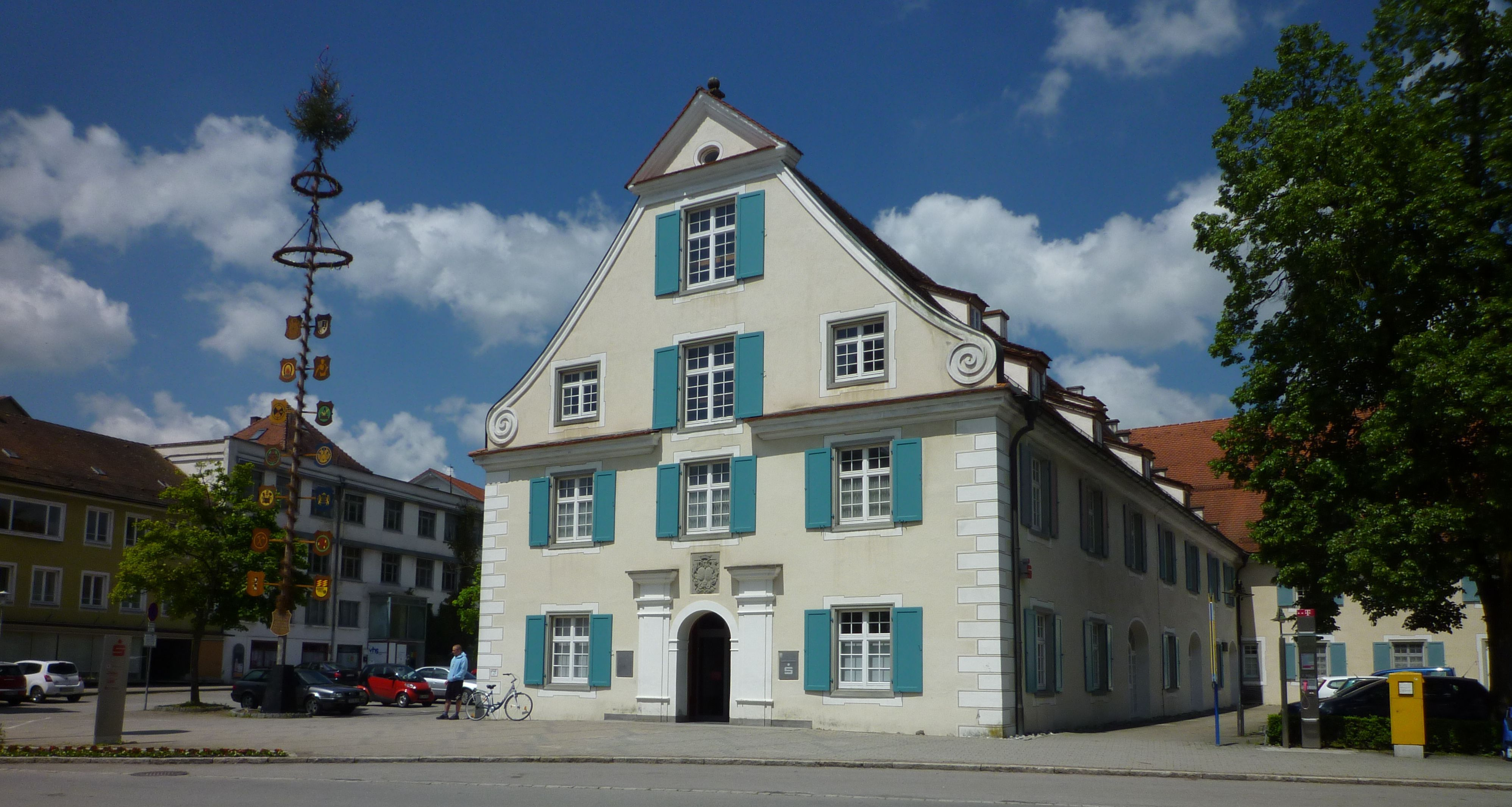 Aulendorf, Rathaus mit Maibaum